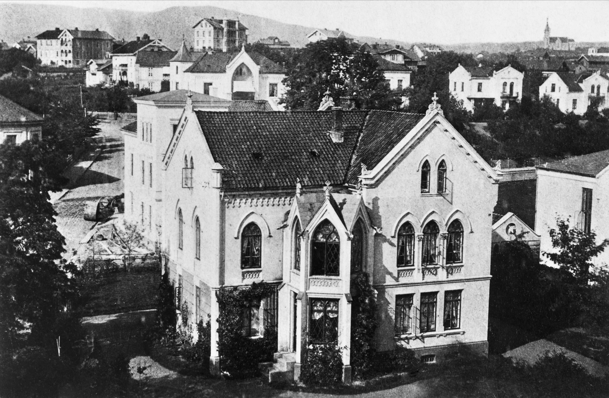 Oscars gate 19 fotografert av Olaf Martin Peder Væring ca. 1880. Revet. Fra Byhistorisk samling hos Oslo Museum.